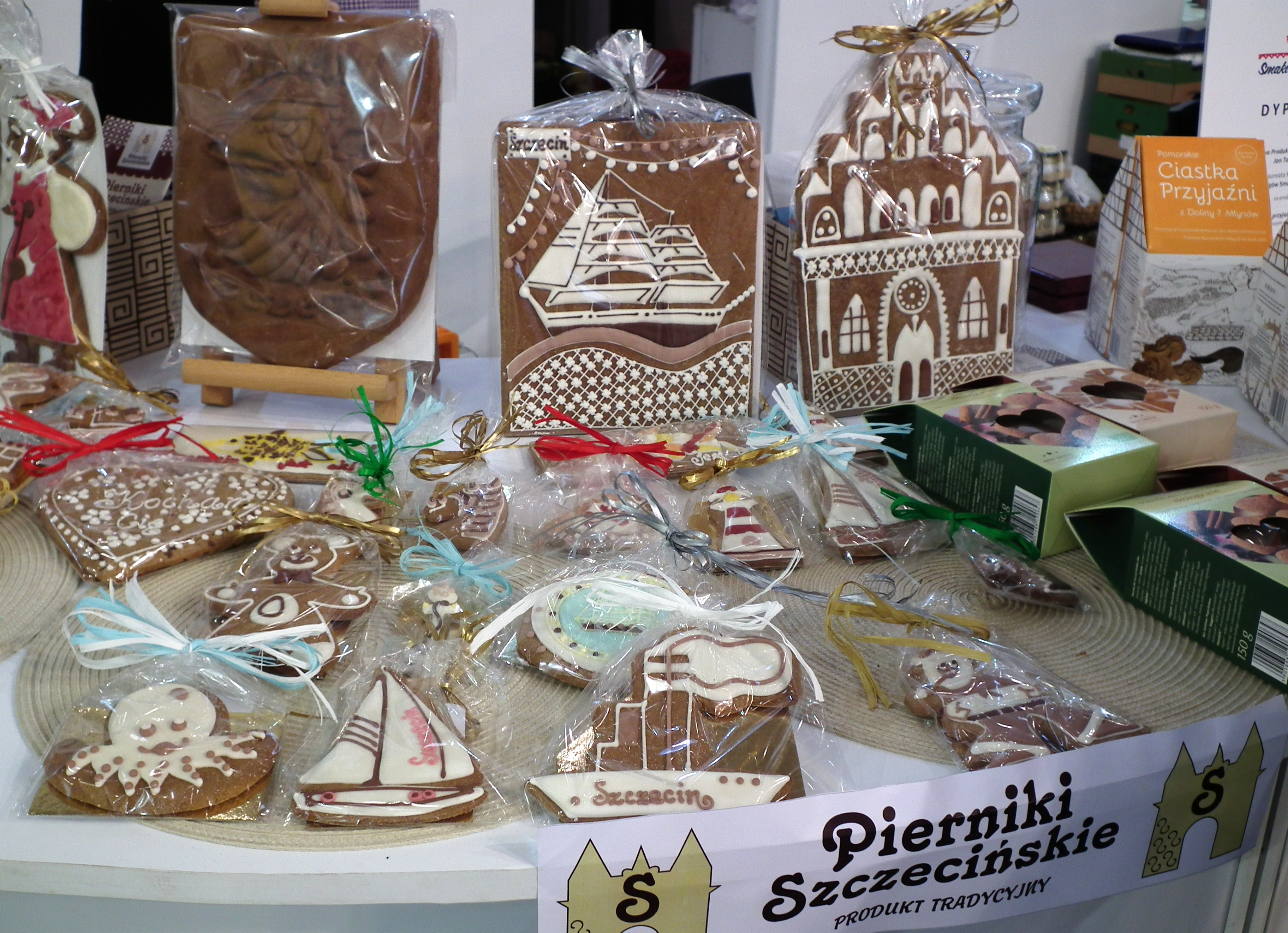 Targi Smaki Regionów 2017 - Poznań. Pierniki Szczecińskie.